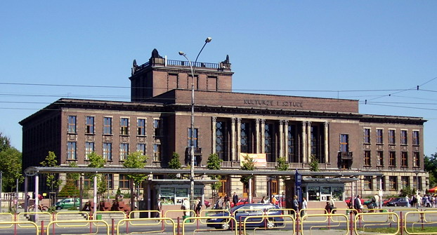 Dąbrowa Górnicza, plac Wolności 1 - budynek Pałacu Kultury Zagłębia (zabytek A-1240/79 z 22.11.1979)